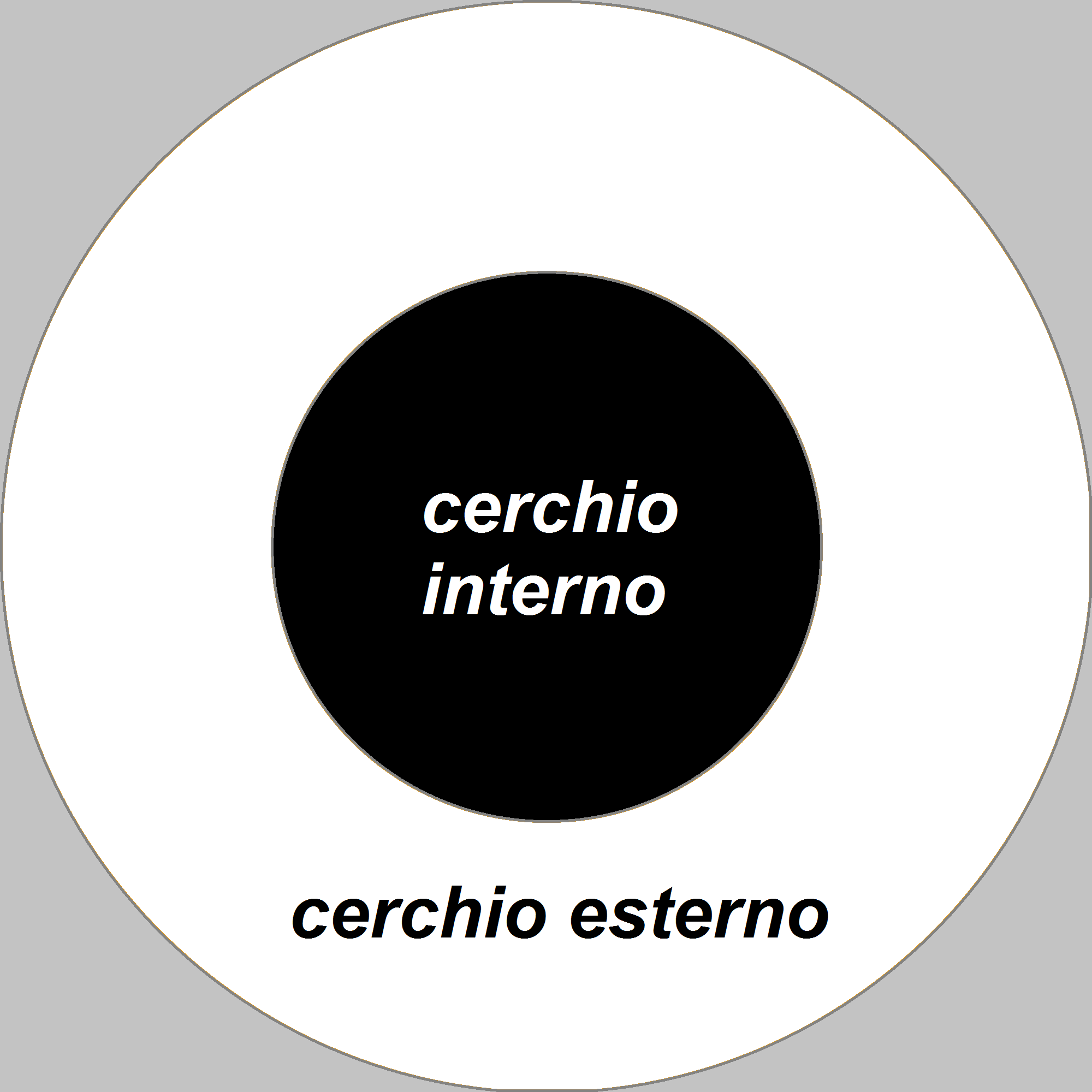 Cerchio interno dentro quello esterno come rappresentazione del rapporto tra esoterismo ed exoterismo.